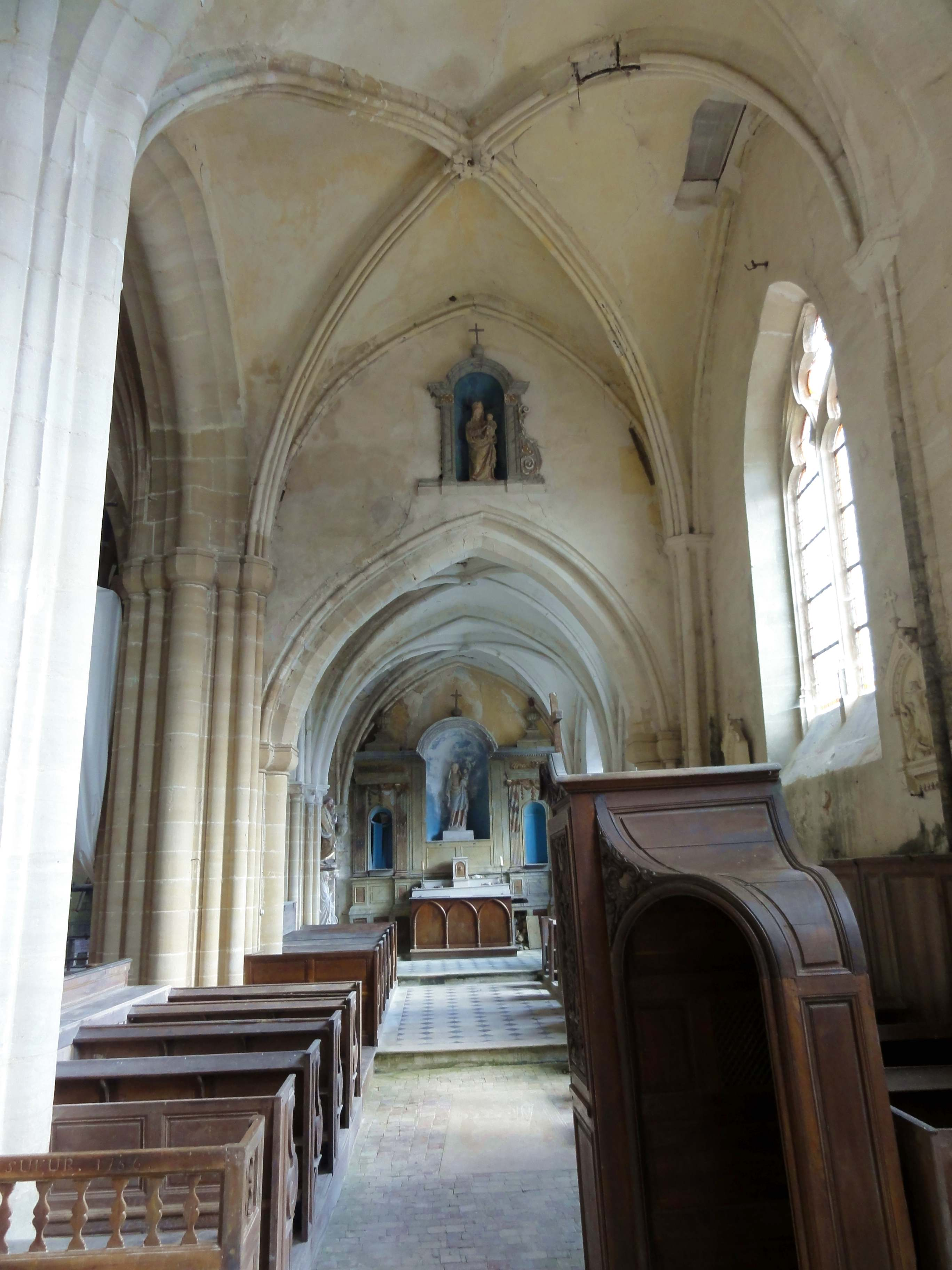 Intérieur de l'église - voir le titre du fichier.